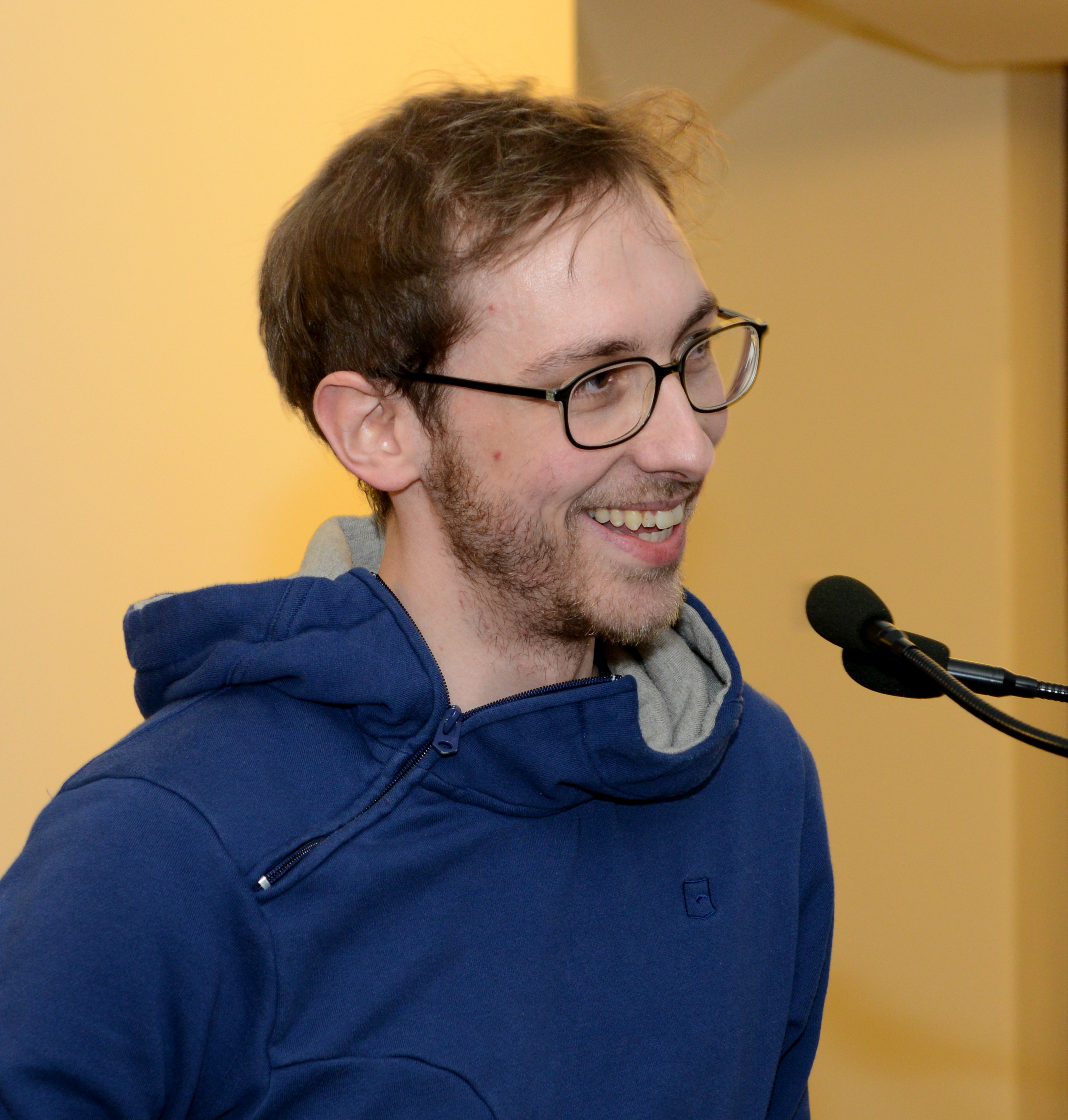 De Jeff Desom bei senger Usprooch bei der Ouverture vu senger Expositioun "Holorama" am Ratskeller vum Zerkel. "Holorama" ass eng Installatioun am Kader vun "Discovery Zone, Luxembourg City Film Festival 2014" an dauert vum 28. Februar bis den 23. Mäerz 2014.